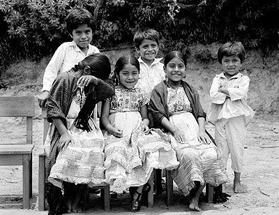 Niños chatinos, del sur de Oaxaca (México)